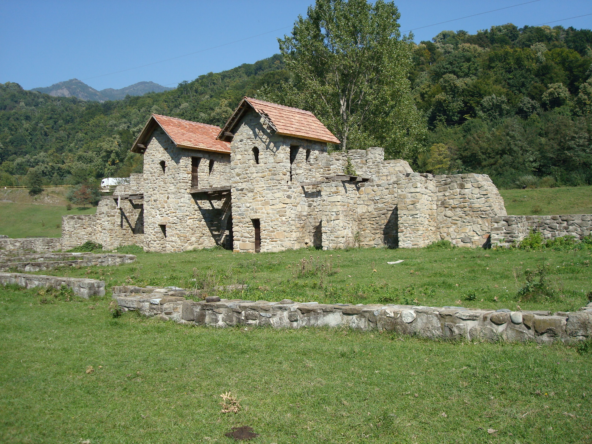 Castrul roman Arutela